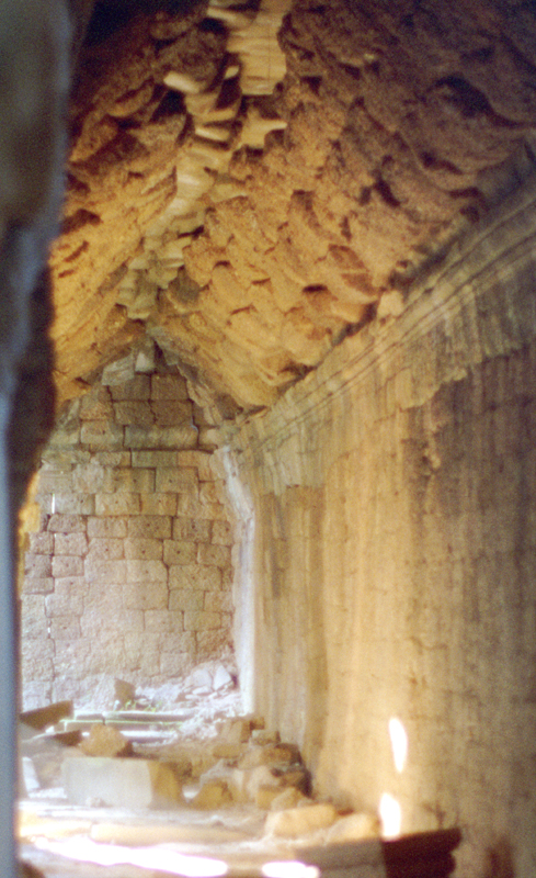 Intérieur d'un galerie du Ta Prom. On y voit l'intrados de la vôute en encorbellement et l'appareillage aléatoire des blocs de pierre des murs.